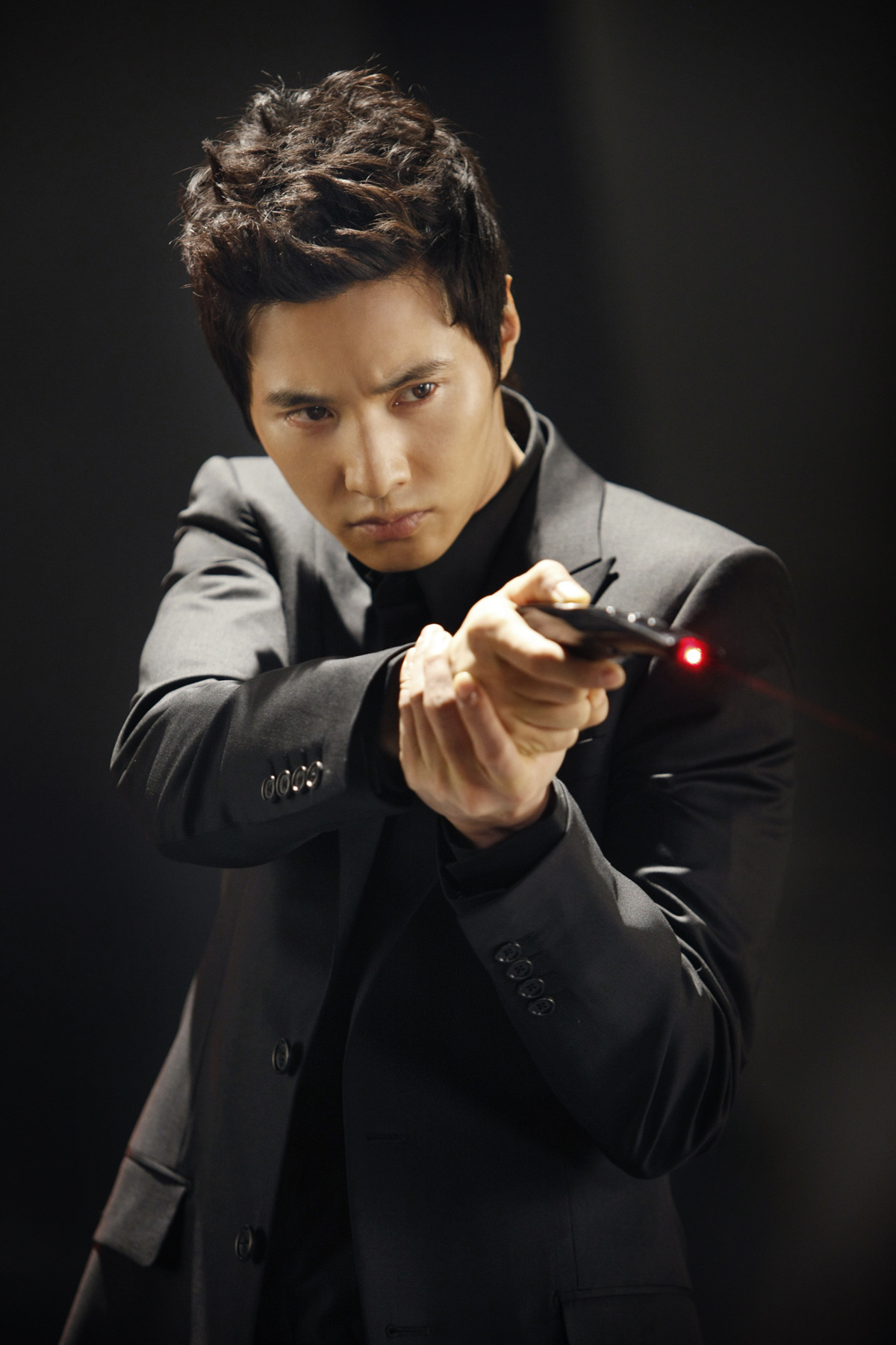 LG전자, 스마트TV 모델로 한류 톱스타 원빈 선정